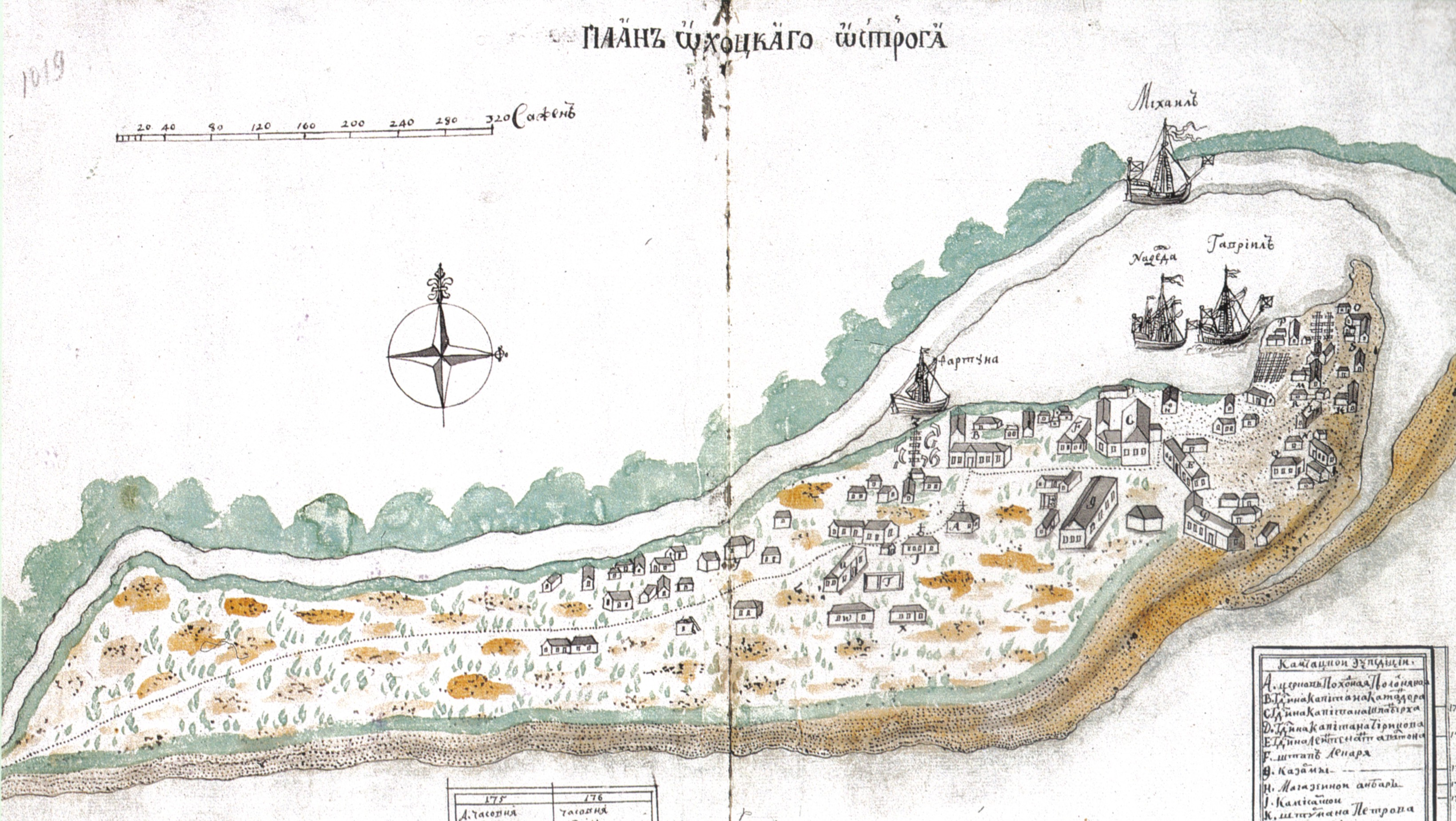 Map of Okhotskoi Ostrog, ink drawing, 1737 (State Marine Archive St. Petersburg)